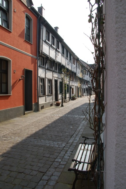 Restaurierte Häuser in der Alten Schulstraße, Kempen